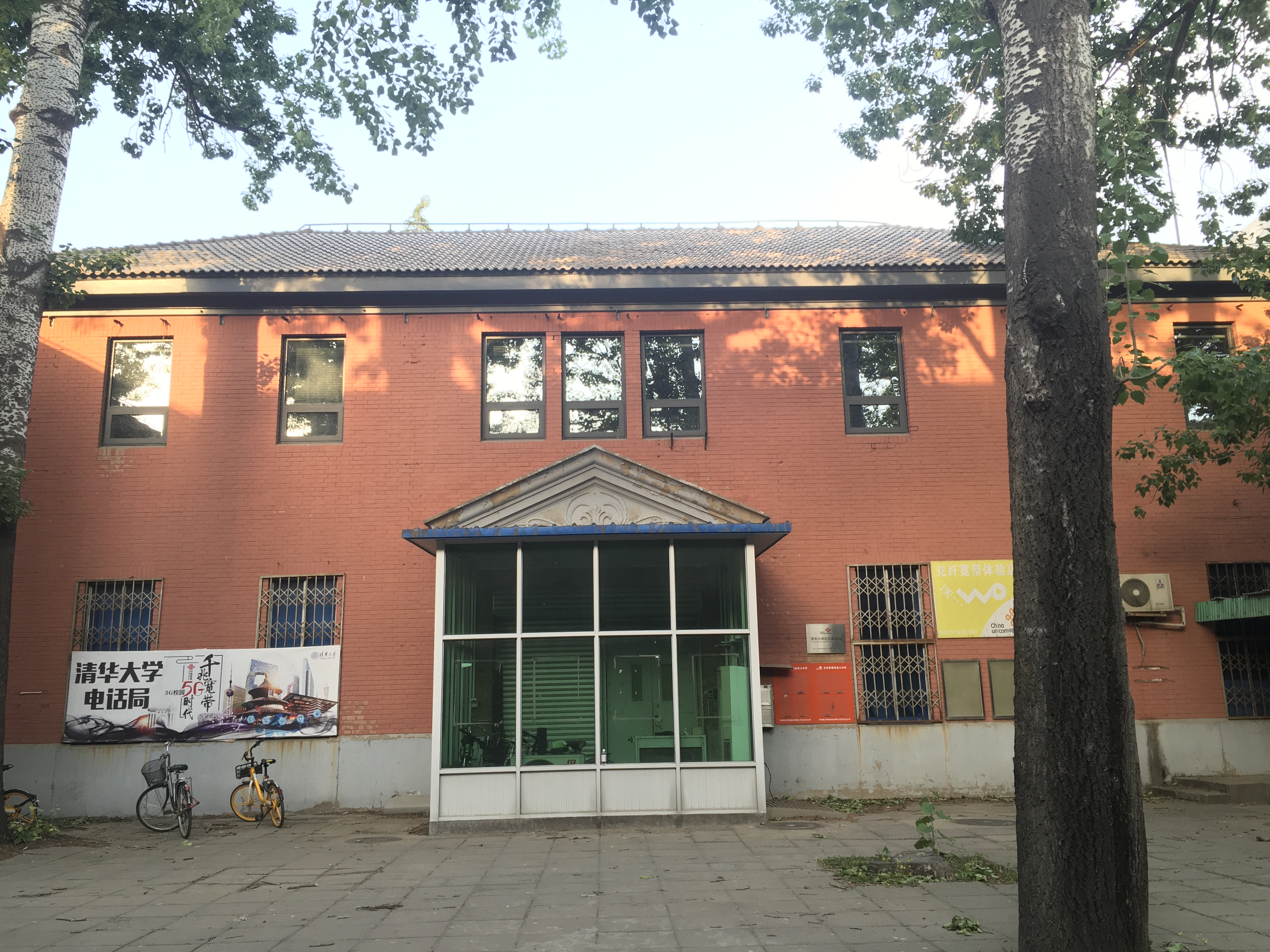 第一代清華航空館，現為電話局